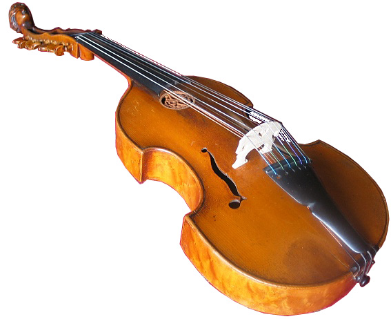 Viola d'amore um 1770, Joseph-Nicolas Leclerc au quinze-vingts Paris. Brandmarke: Leclerc 1520 Paris